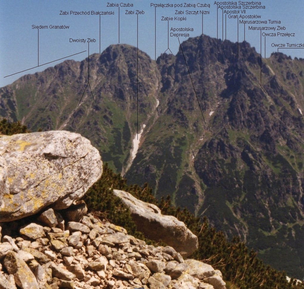 Północna część Żabiej Grani. Widok z Doliny za Mnichem